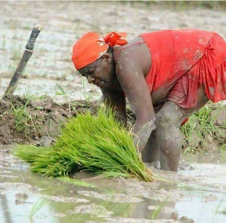 UNE FEMME QUI TRAVAILLE MANUELLEMENT DANS UN CHAMPS DE RIZ EN CASAMANCE (SUD DU SÉNÉGAL) This is an image of "African people at work" from Senegal